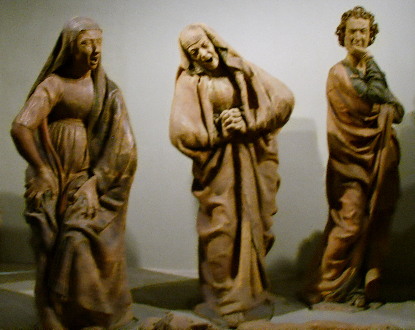 Niccolò dell'arca, Compianto sul Cristo morto, Chiesa di S. Maria della vita, Bologna